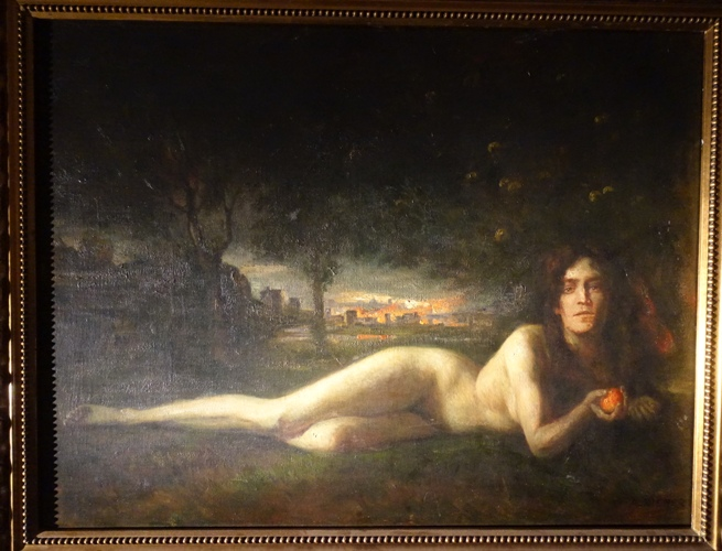 Ölgemälde von August Rieper, liegender Akt vor brennender Stadt